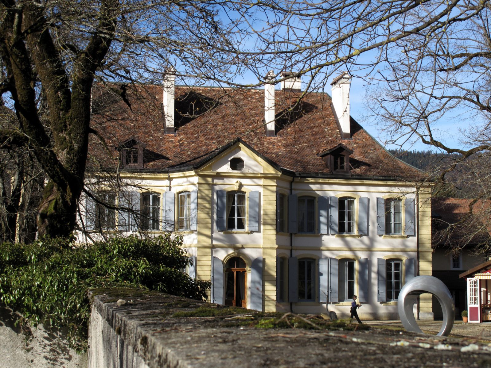 Môtiers, maison d'Ivernois